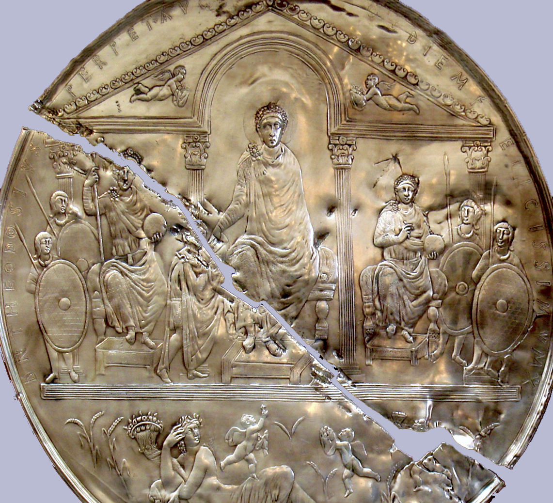 Réplica moderna del Missorium o Disco de Teodosio. Museo Nacional de Arte Romano, Mérida (original en la Real Academia de la Historia, Madrid). Esta imagen es una edición de mi obra RéplicaMissoriumTeodosioMNAR.JPG